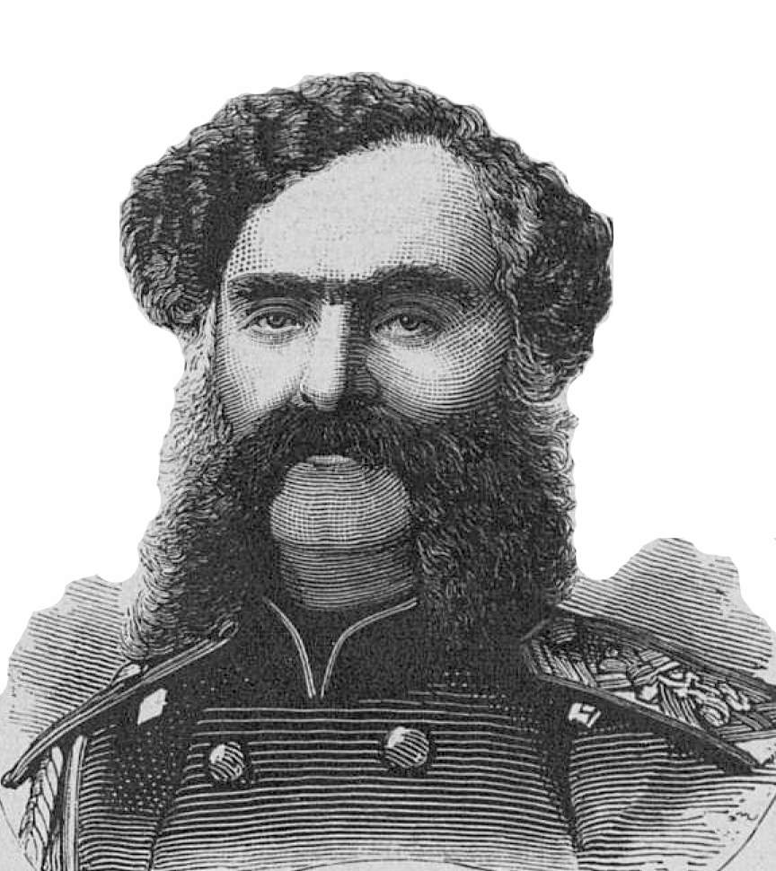 Генерал-майор Амилахори Иван Гивич, 1878 год